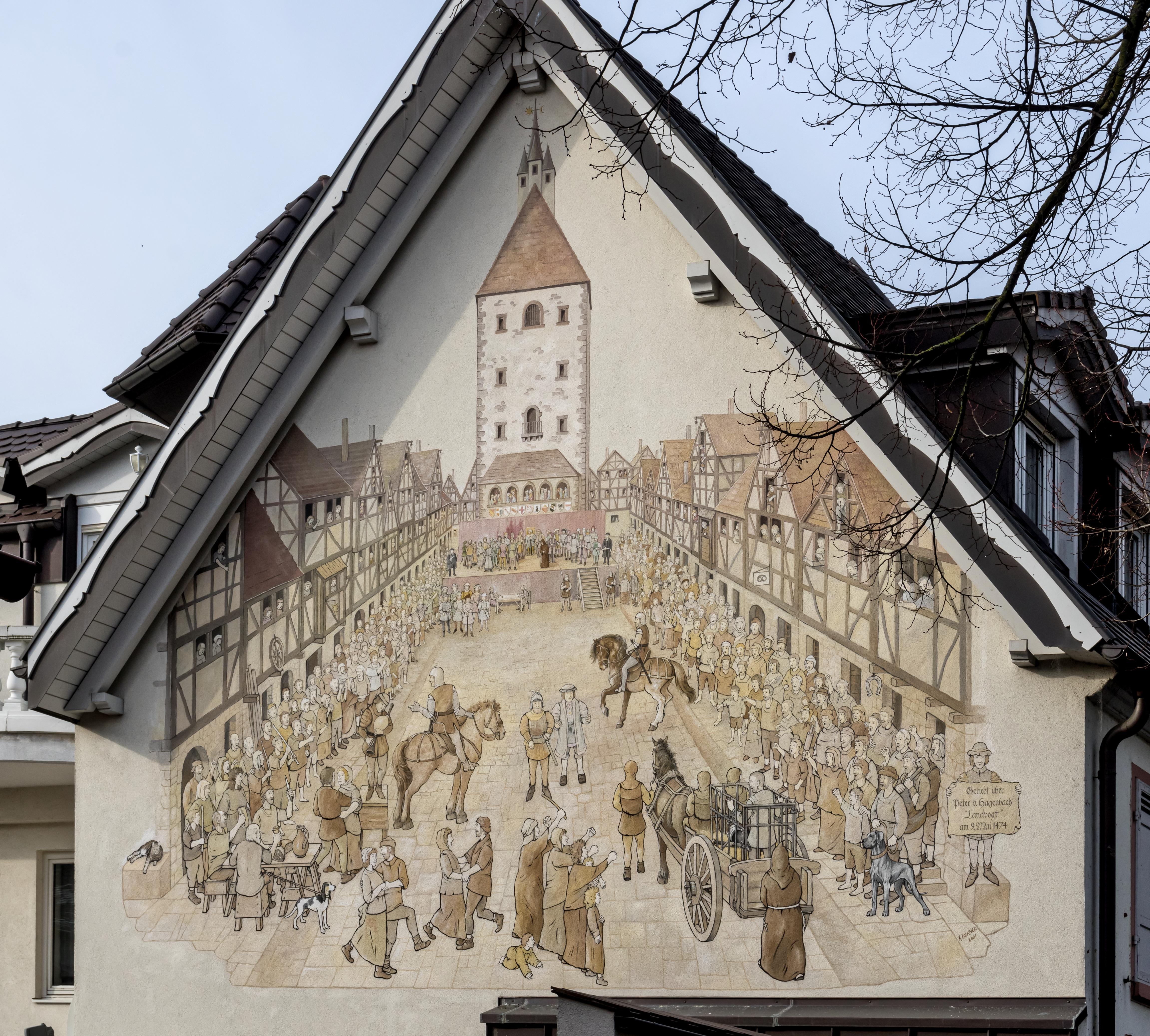 Bilder aus Breisach am Rhein Der Münsterberg Fassadenmalerei: Gericht über Peter von Hagenbach Landvogt am 9.Mai 1474 von K. Falkner 2001 Das Bild unterliegt der Panoramafreiheit in Deutschland